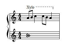 Notation eines Xylo-Tones